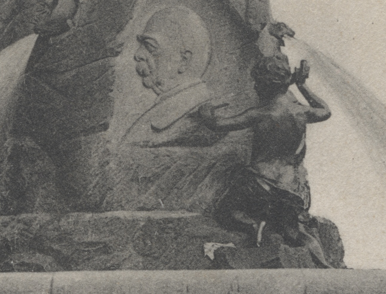 Bismarckbrunnen Flensburg 1906 Künstler - geerbt